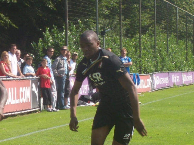 Miquel Nelom tijdens een training